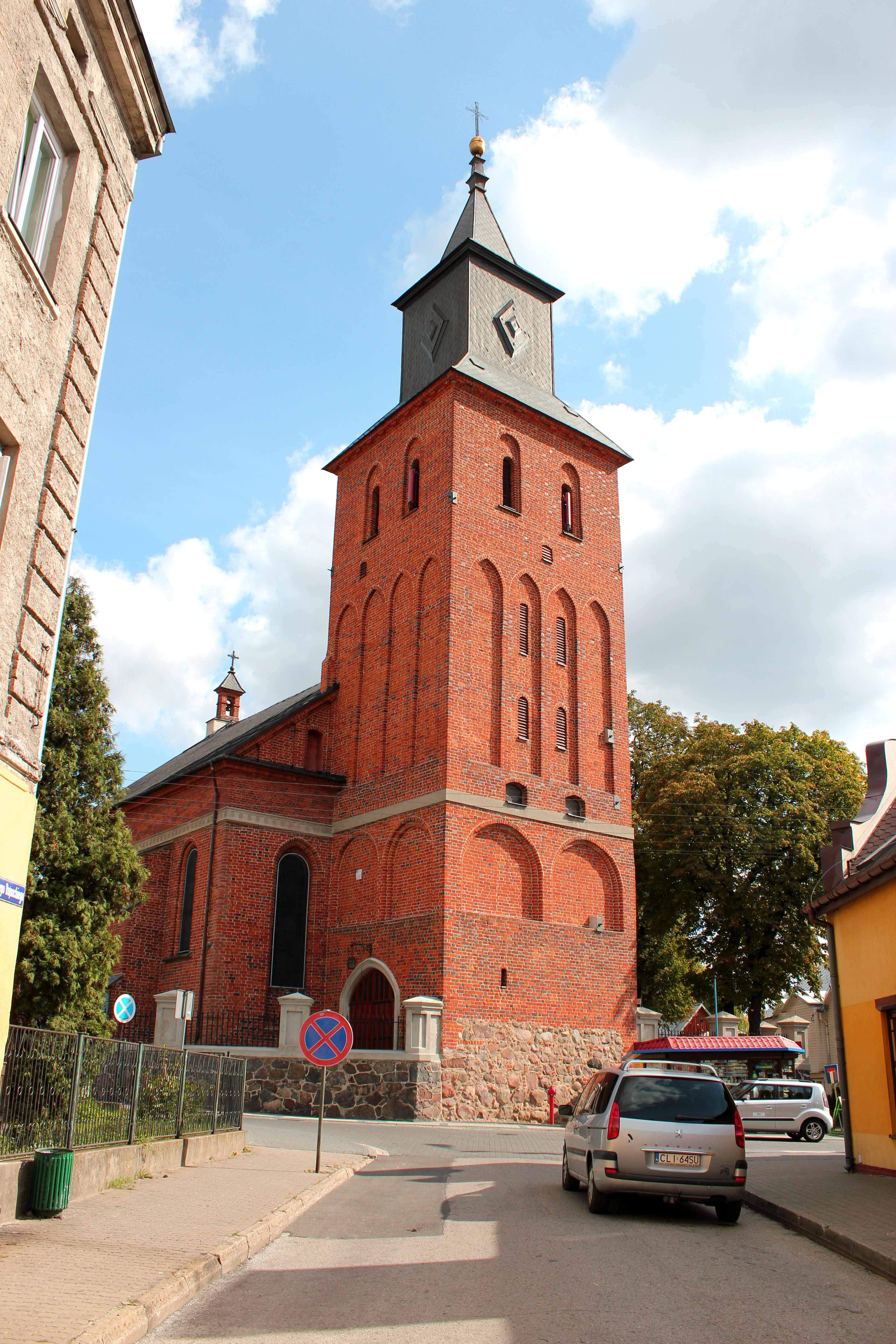 Lipno - kościół par. p.w. Najśw. Marii Panny, 2 poł. XIV